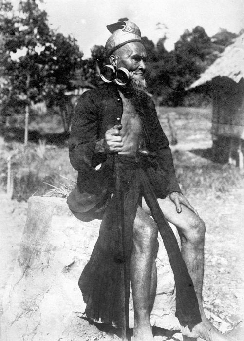 Repronegatief. Öri-hoofd uit Nias